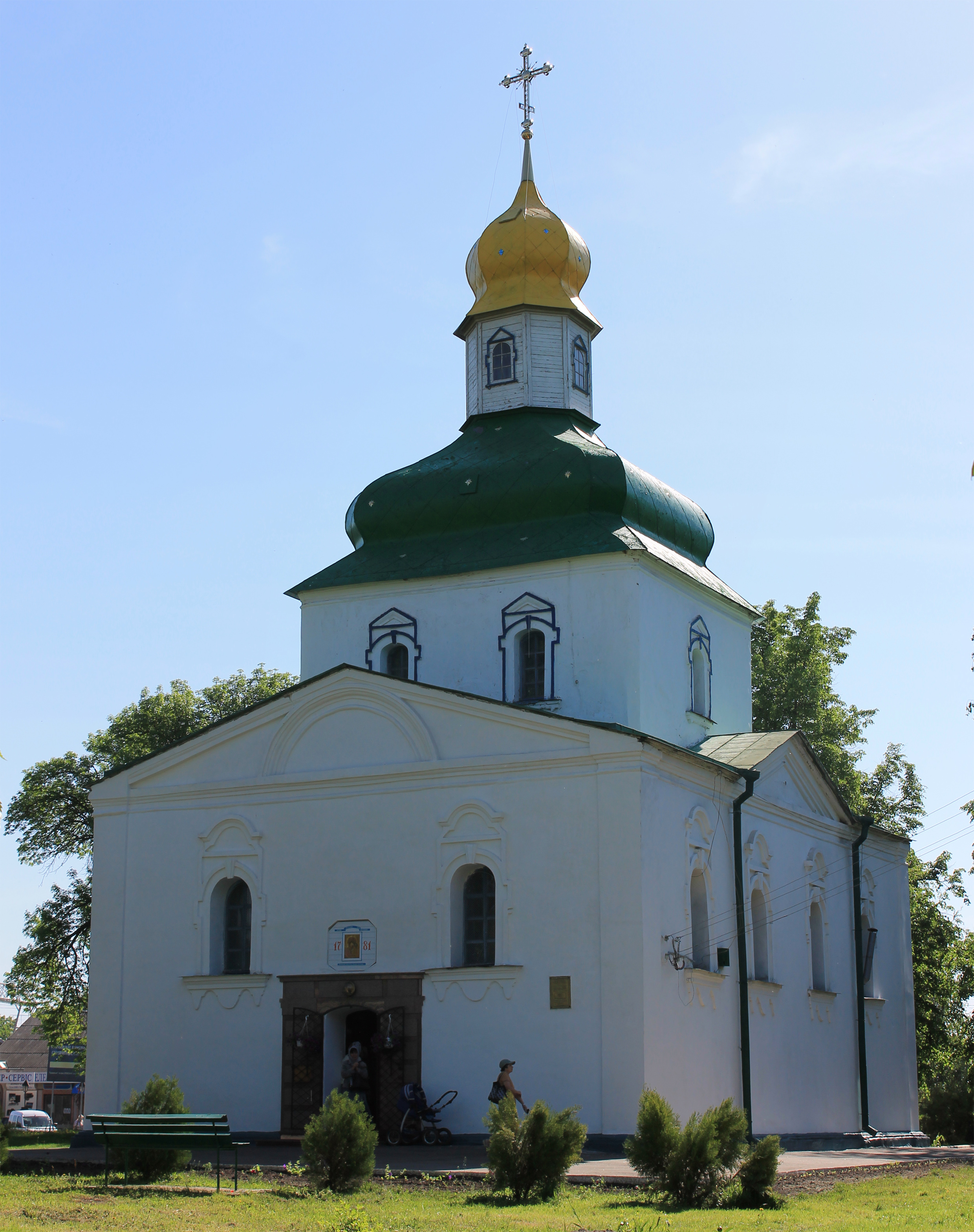 Собор Рiздва Богородицi 1781р. м.Пирятин